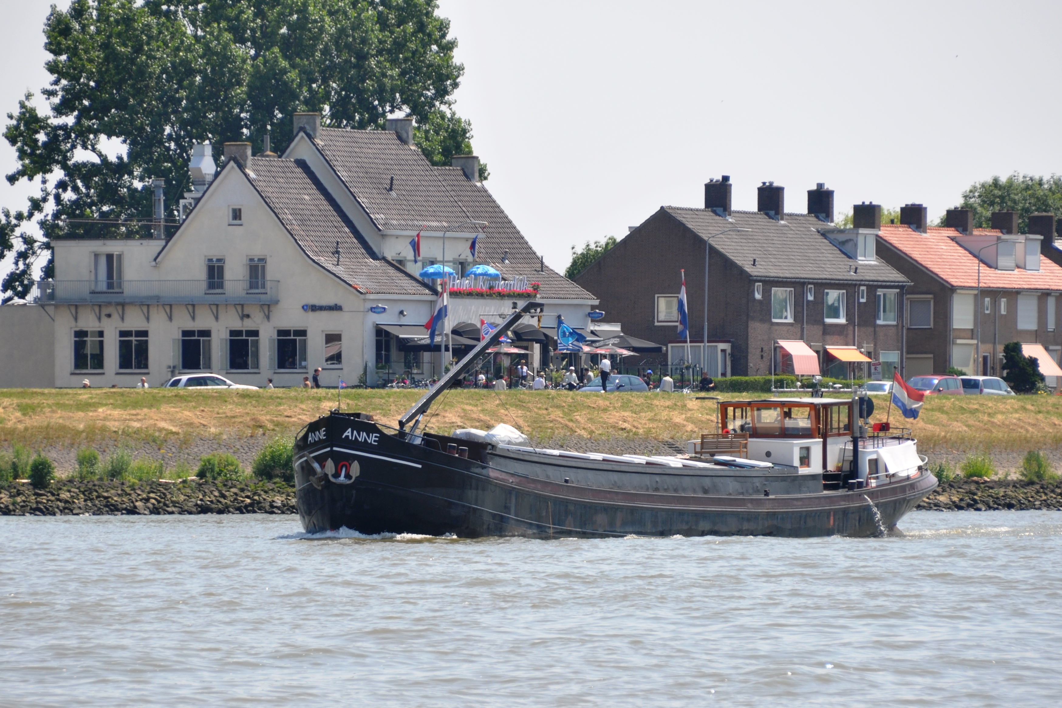 De ANNE in de opvaart op de Noord